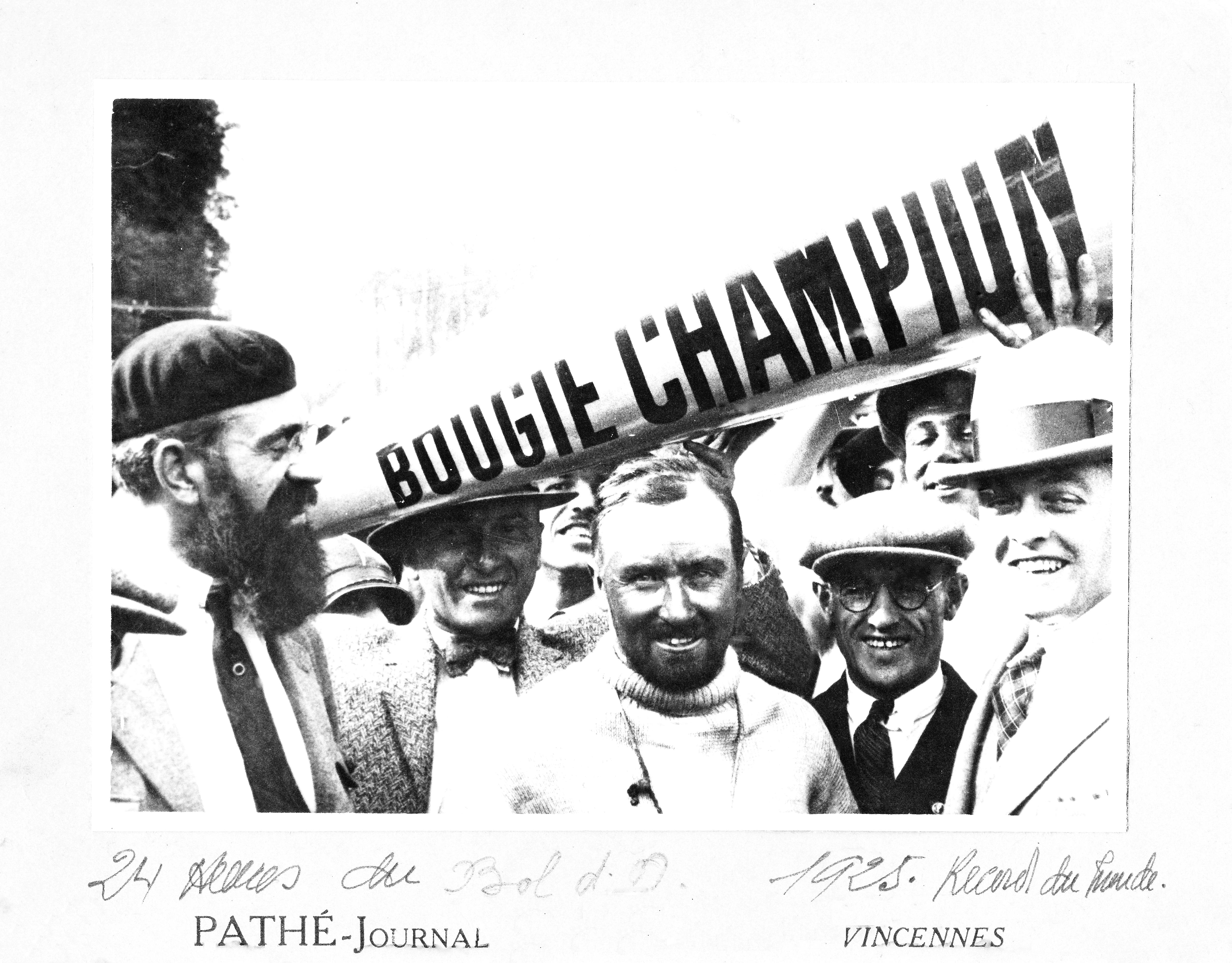 Bol d'Or 1925 Record du monde